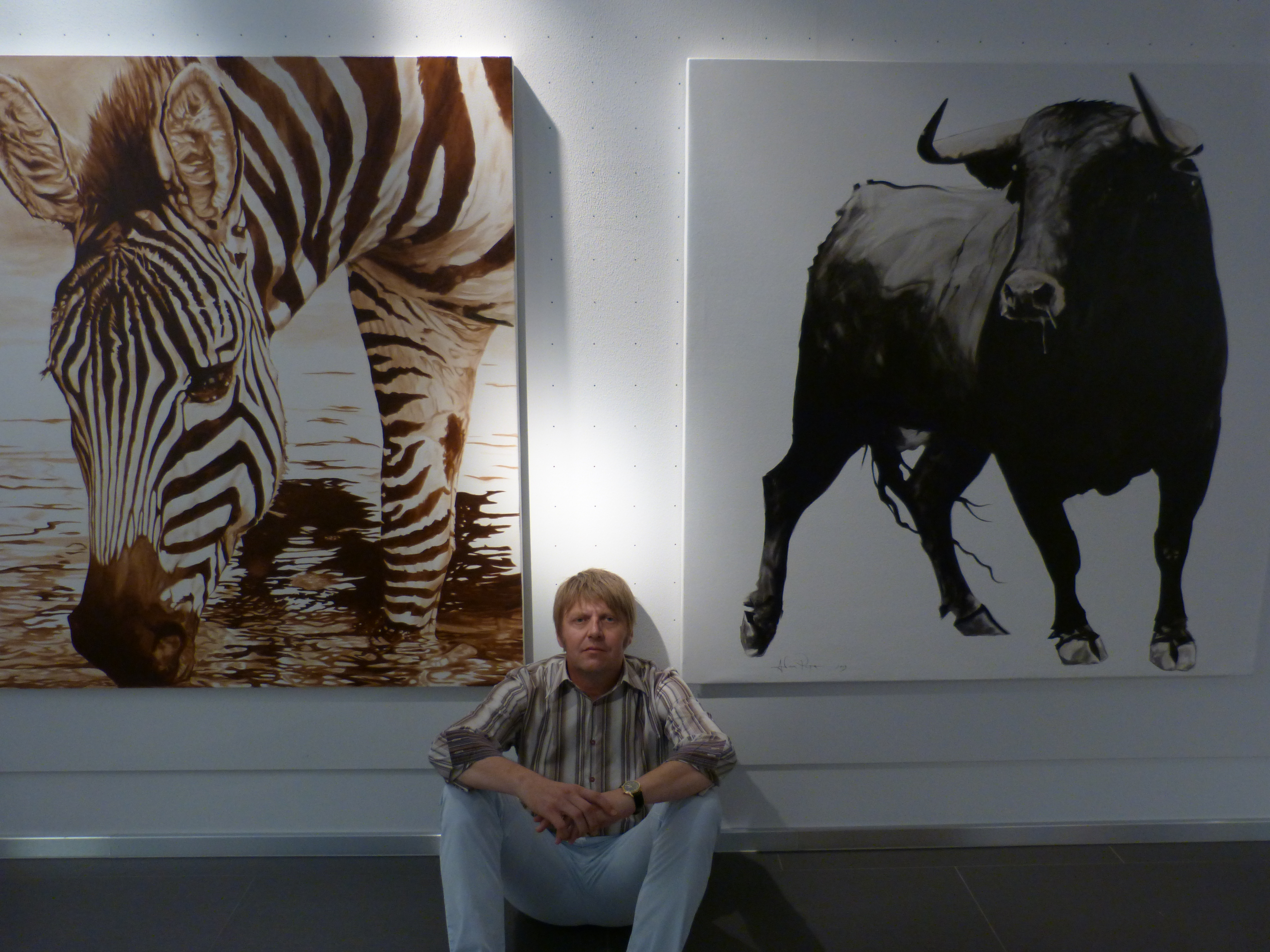 ADAM PETE VOR ZWEI SEINER GEMÄLDE "WASSERLOCH" UND "ENTRADA BLACK AND WHITE" IN DER GALERIE MENSING IN PALMA DE MALLORCA